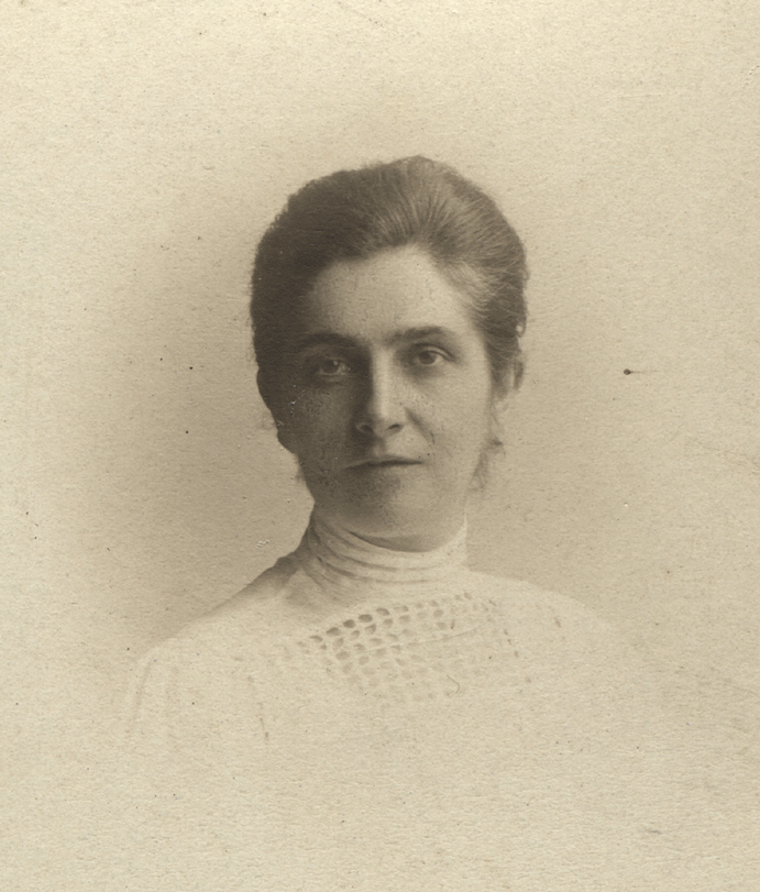 Emilie Snethlage portrait, 1906 (Museum für Naturkunde Berlin/Historische Bild-und Schriftgutsammlungen)